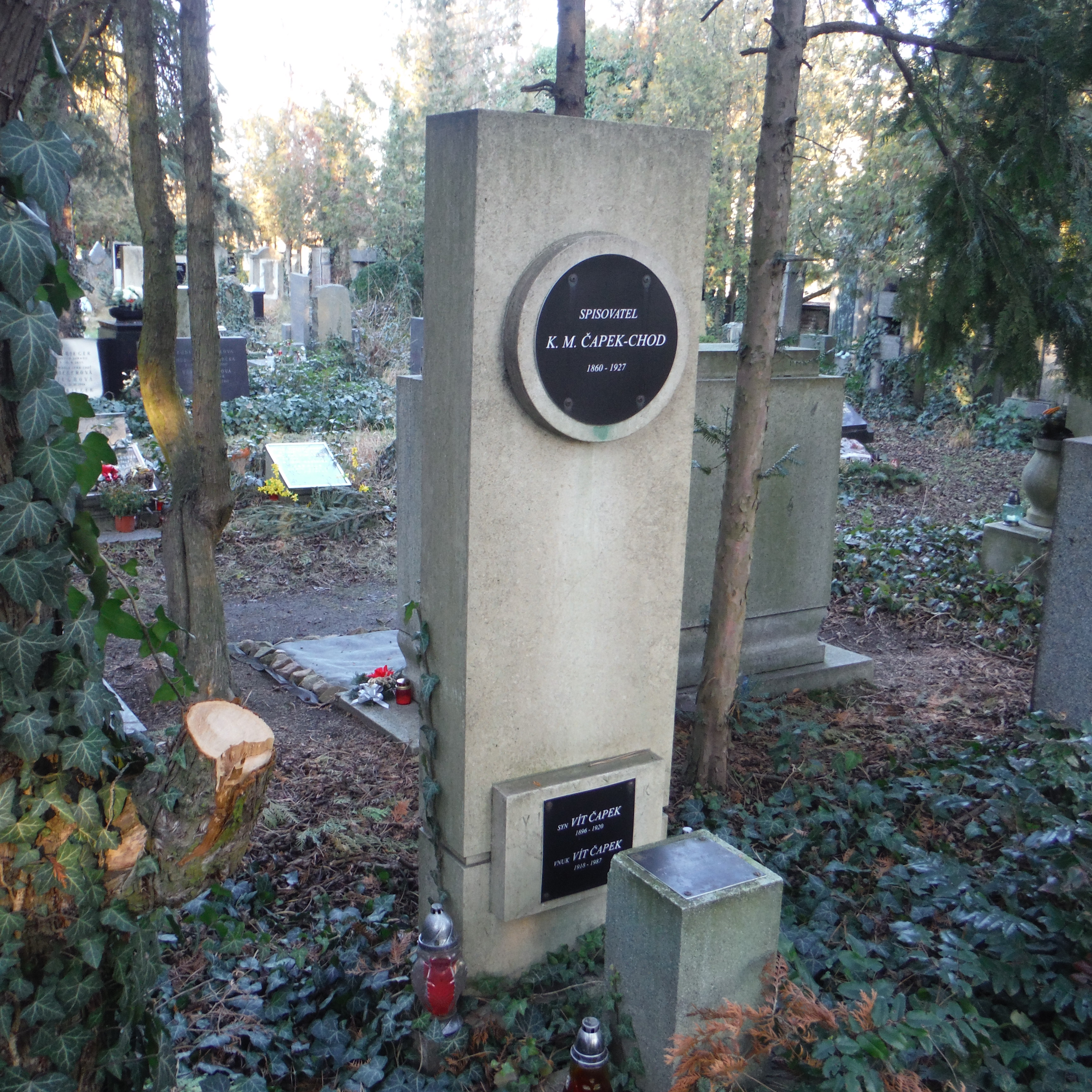 hrob